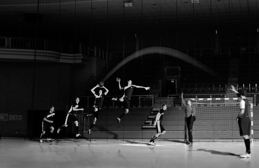 Pascal Hens präsentiert den Kempa Trick